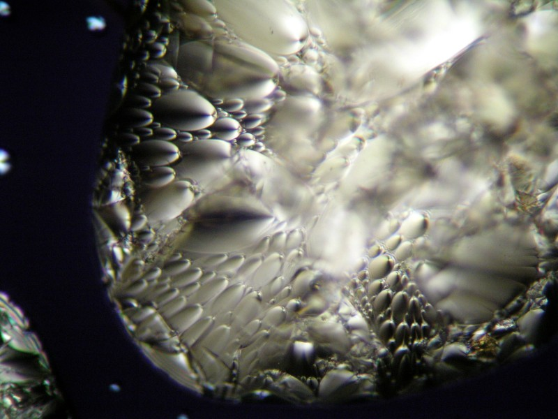 Polarisationsmikroskopische Aufnahme eines liegenden Tropfens eines Flüssigkristalls in der smektischen A-Phase; zu sehen ist eine Polygontextur.